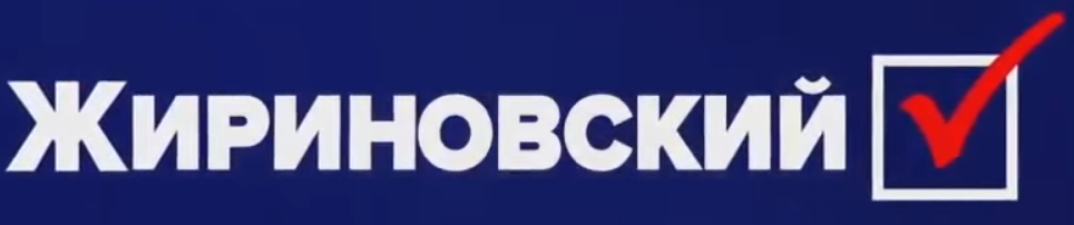 Официальный логотип избирательной кампании Владимира Жириновского 2018